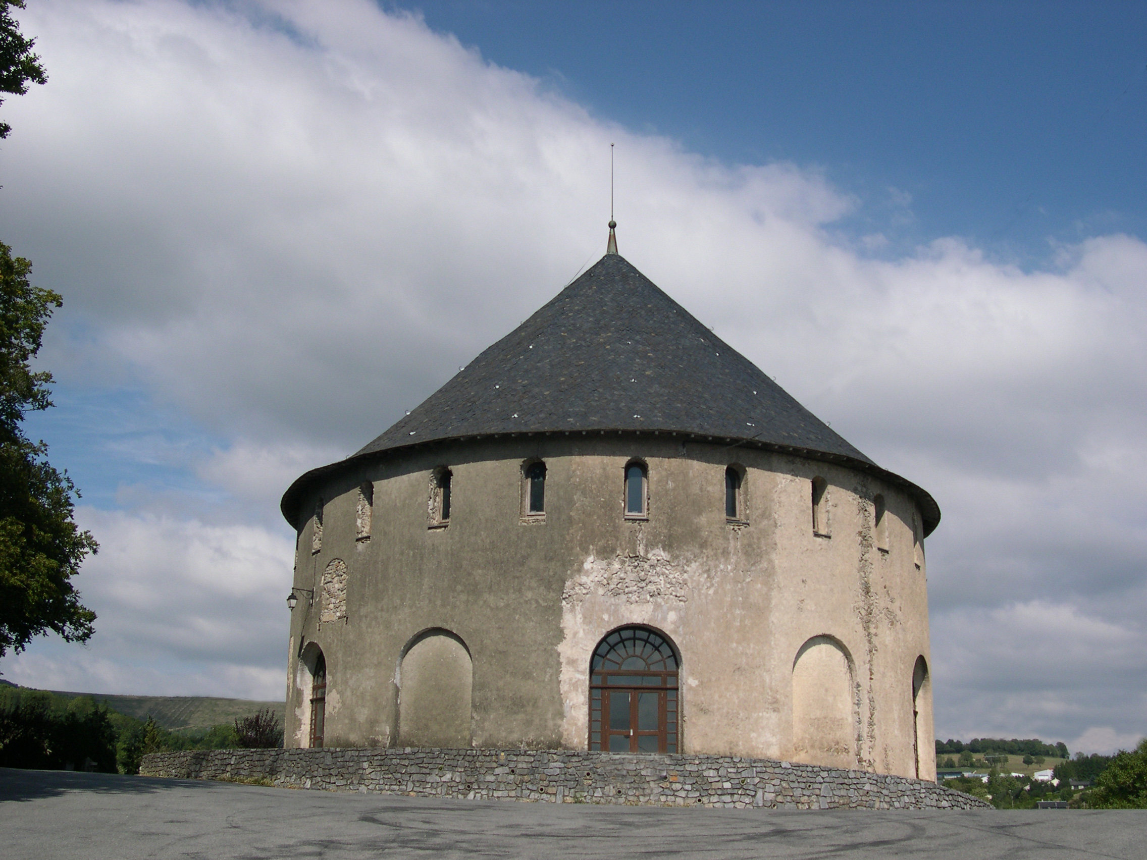 Lacaune (Tarn) - tour-silo de Calmels, servant de grange à foin.